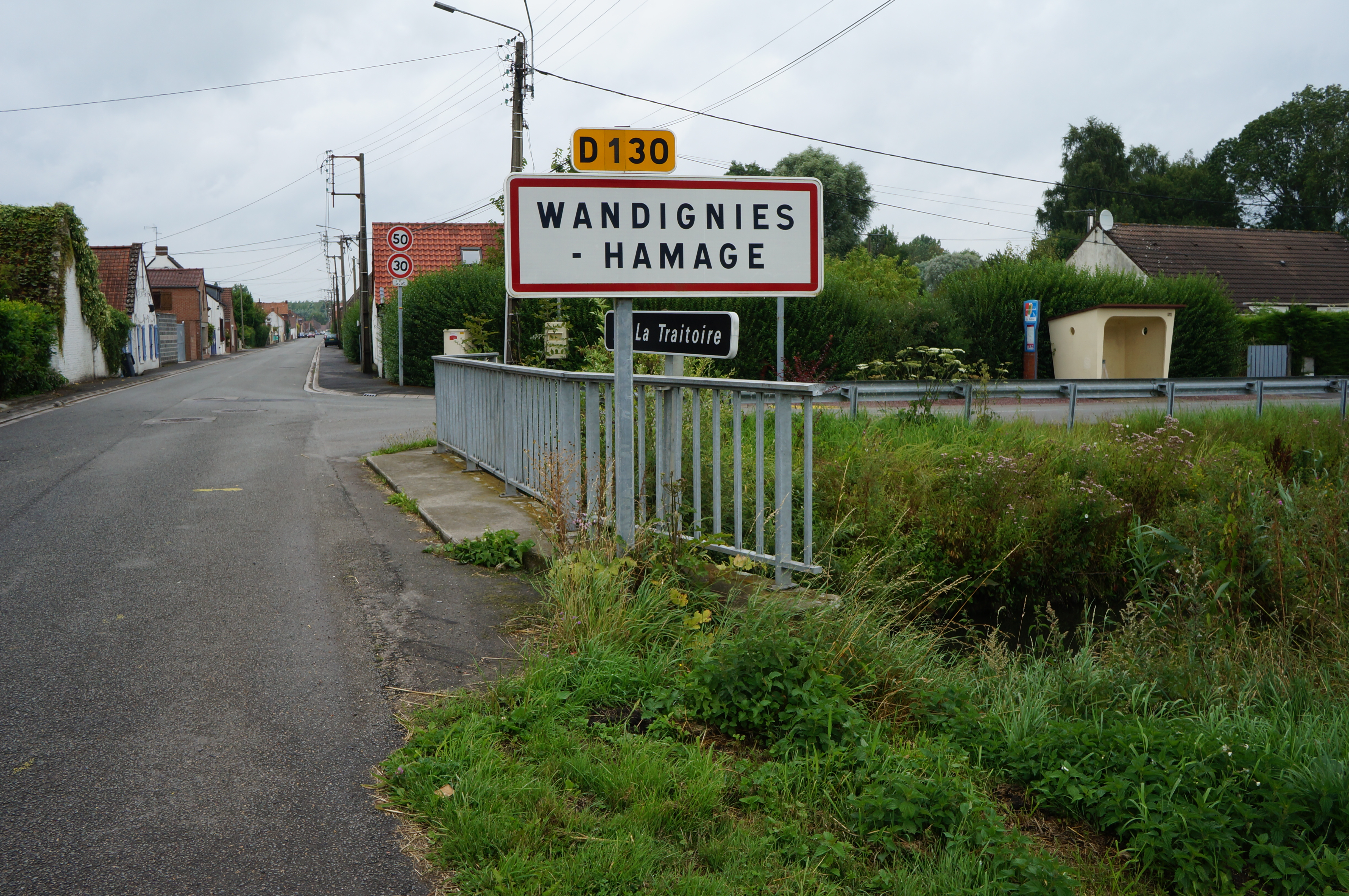 La "Traitoire" affluent de la Scarpe à Wandignies-Hamage Nord-Pas-de-Calais